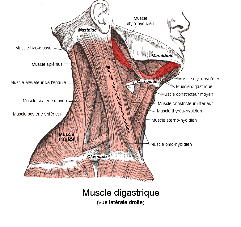 Muscle digastrique. Vue latérale droite. Anatomie humaine